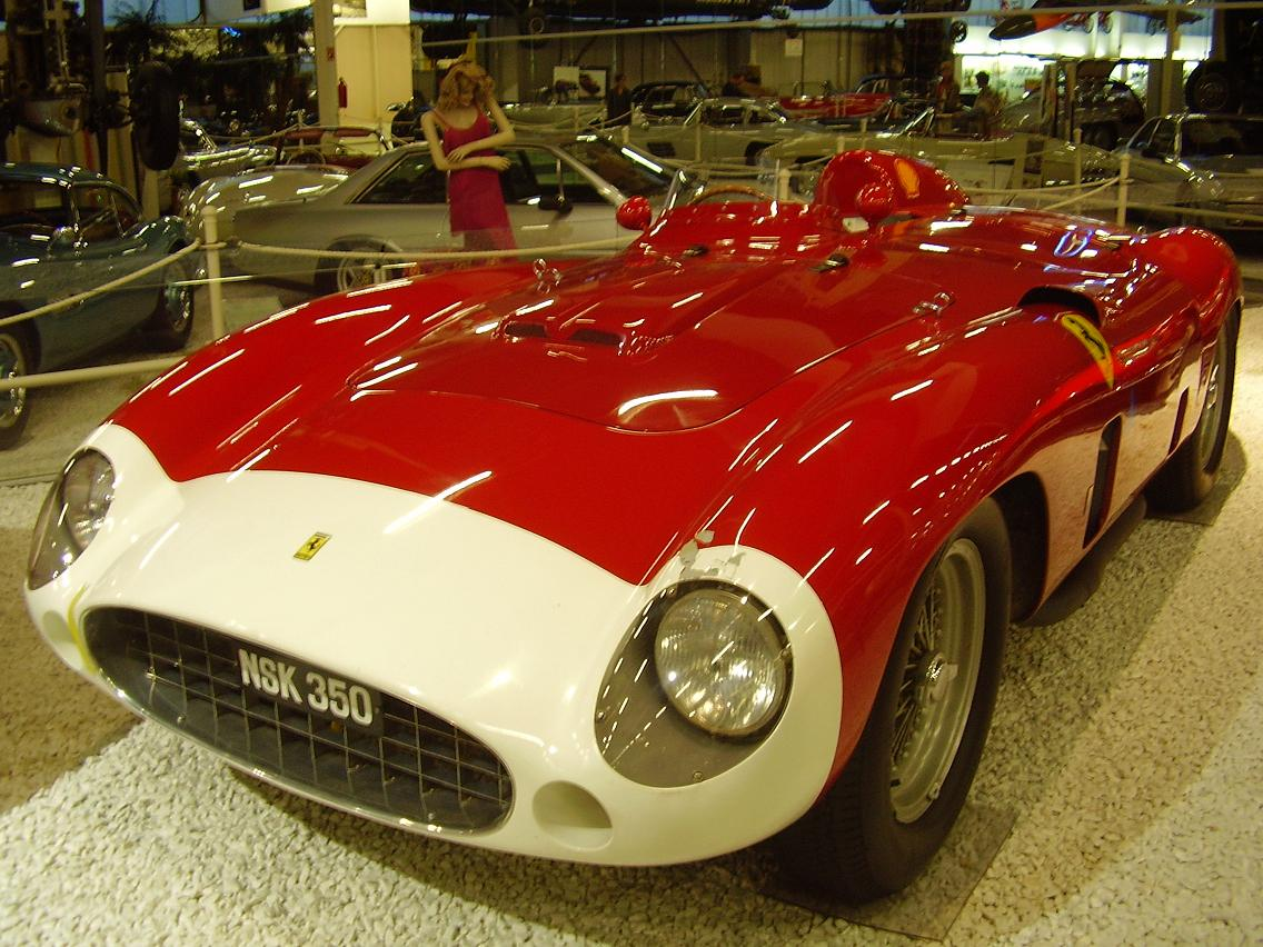 Ferrari 860 Monza Spider Scagliettiat the Sinsheim Auto & Technik Museum (Sinsheim / Germany)